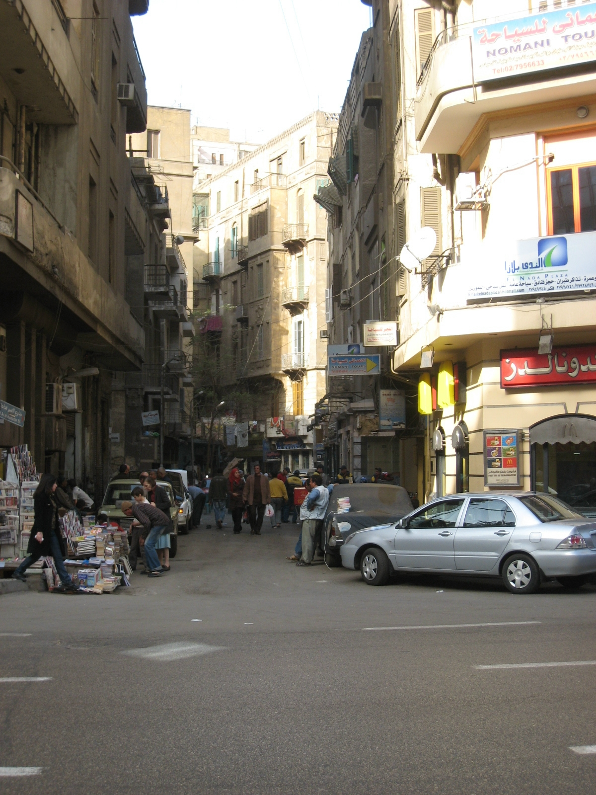 Cairo side street